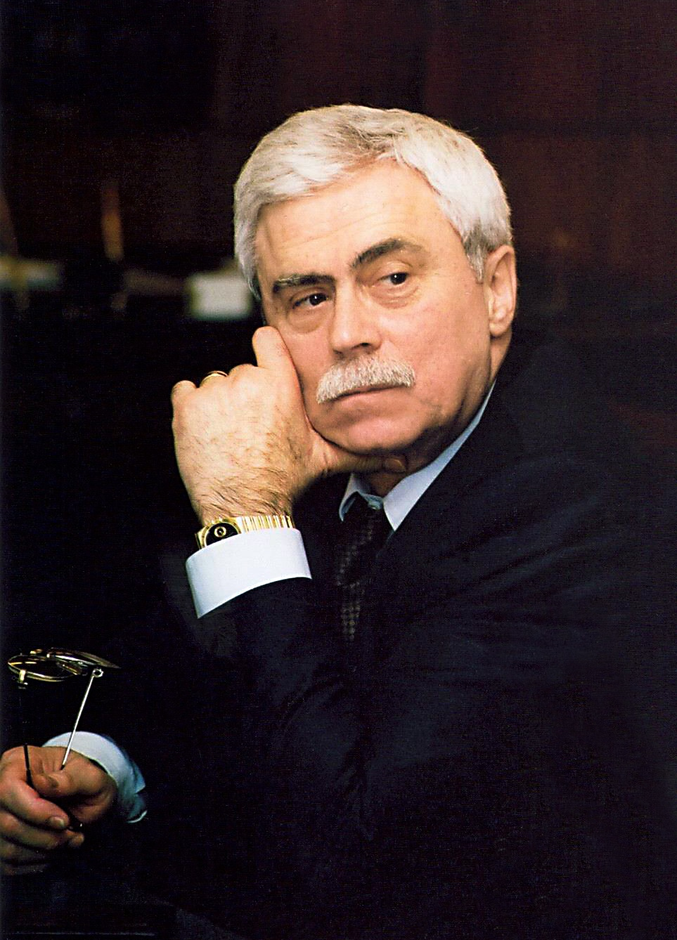 Председатель правления Союза потребителей Украины